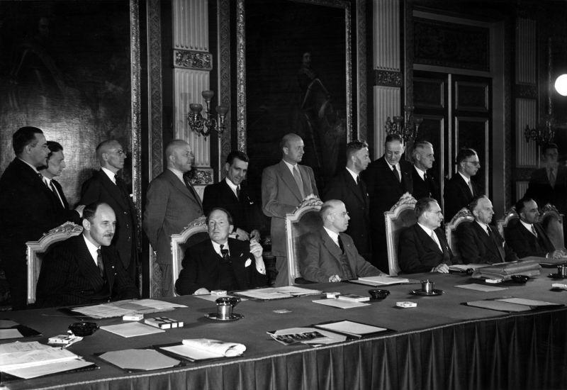 Kabinetszitting van het tweede kabinet Drees (1952-1956). Zittend v.l.n.r: Luns, Beyen, Beel, Drees, Middelburg, Cals. Staand v.l.n.r: Witte, Suurhoff, Van de Kieft, Donker, Mansholt, Algera, Kernkamp, De Bruijn, Zijlstra. Binnenhof, Den Haag, 2 september 1952.